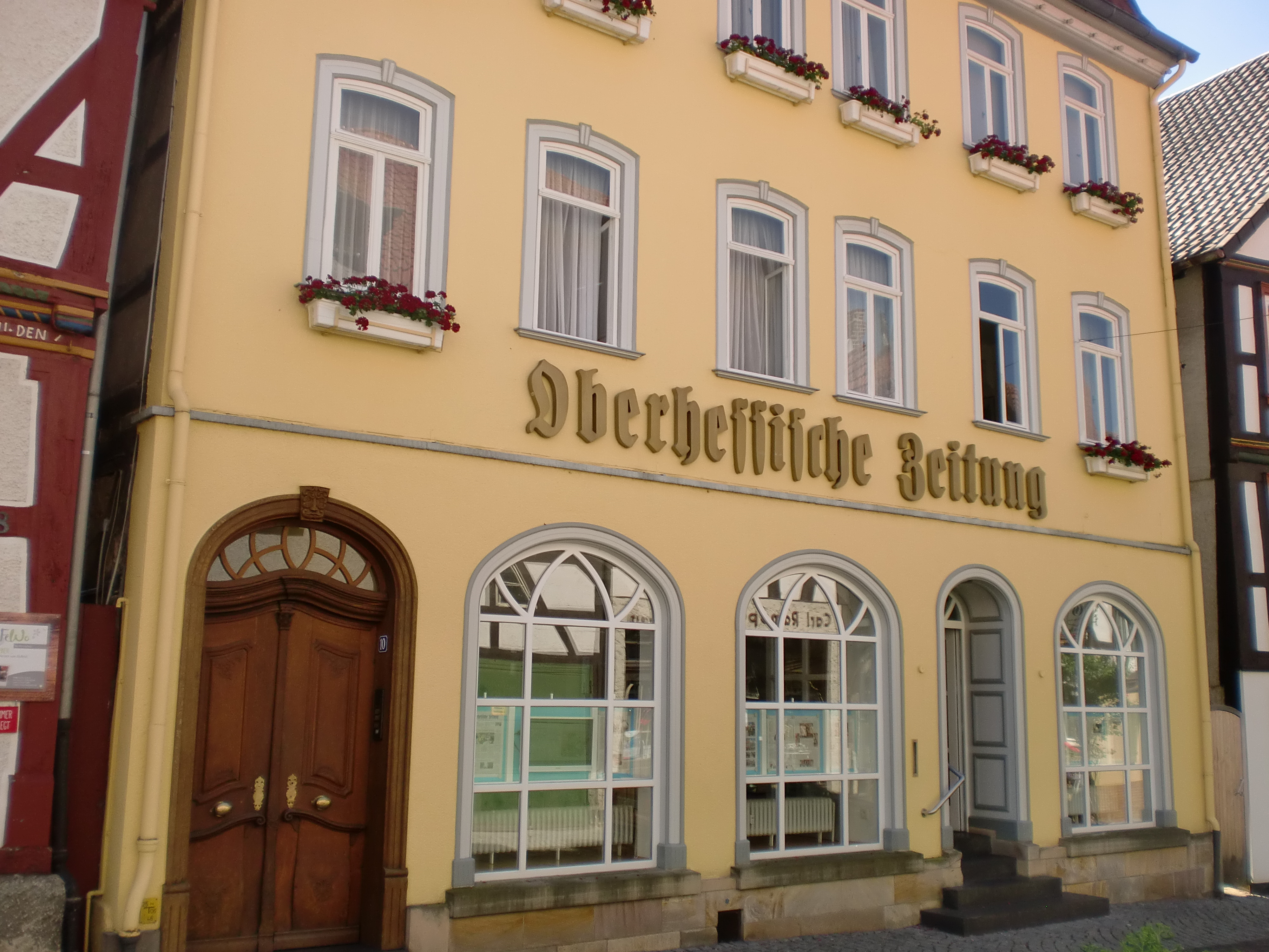 Gebäude von der OZ